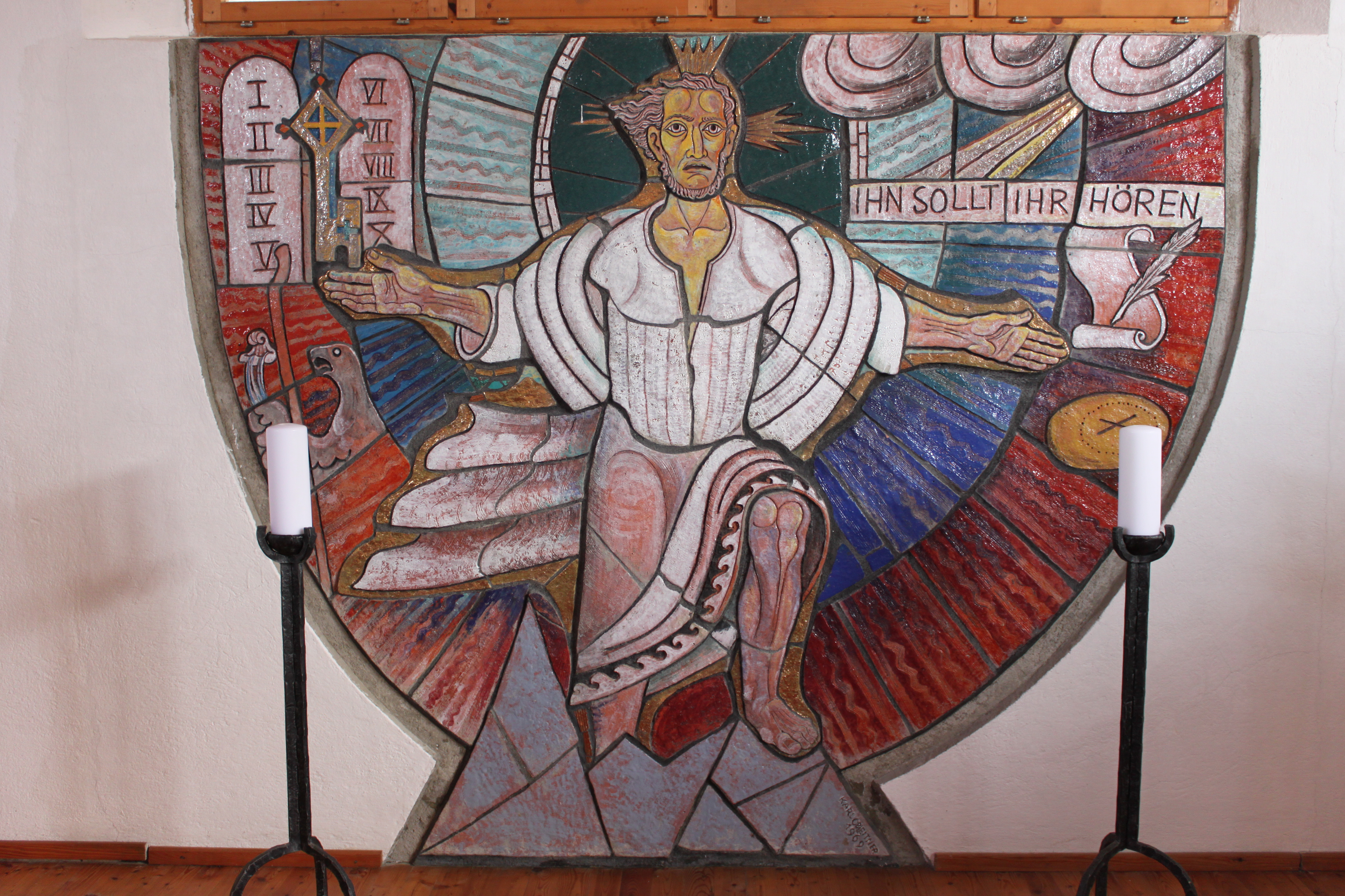 Bild aus bemalten Fliesen